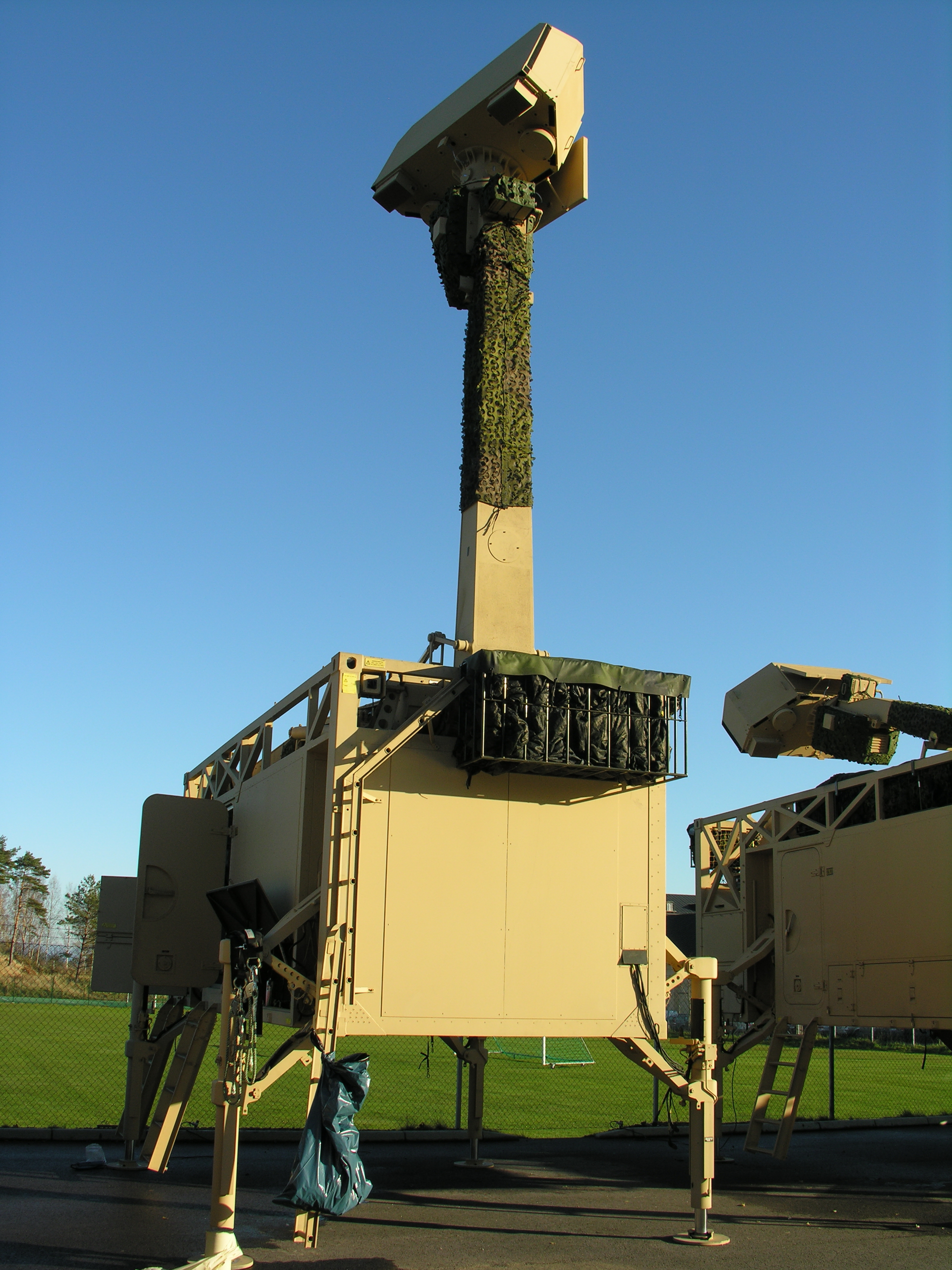 РЛС Giraffe AMB в контейнерном исполнении